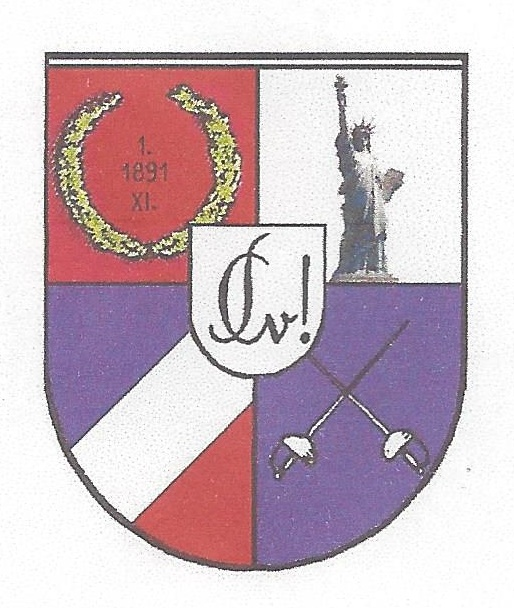 Studentenwappen des Akademischen Fechtclubs Saxonia im Kartellconvent zu Breslau